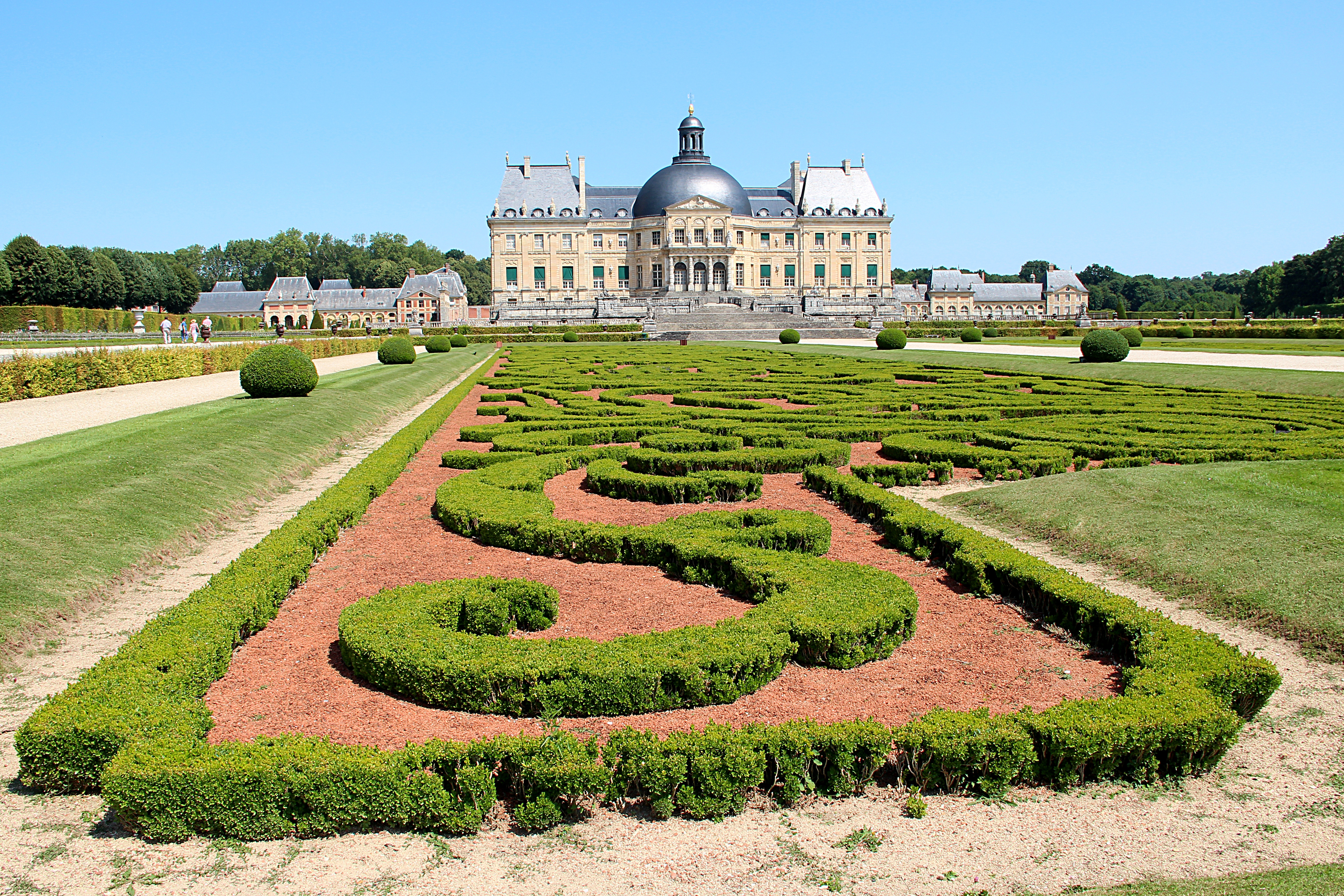 Broderies des jardins et château de Vaux-le-Vicomte - Maincy (Seine-et-Marne, France).